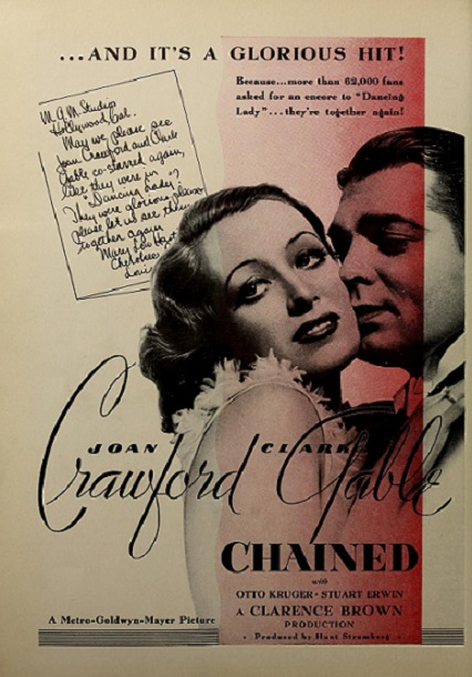 Chained, pagina pubblicitaria